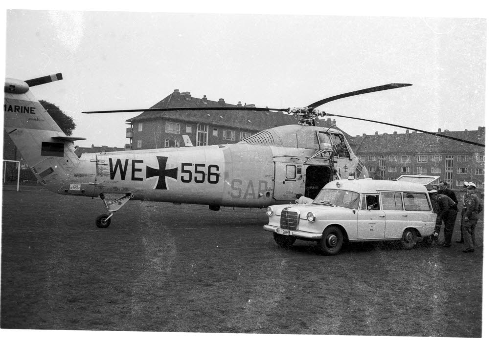 Verladung des Patienten in den Krankenwagen nach der Landung auf Sportplatz Gelehrtenschule an der Feldstraße.